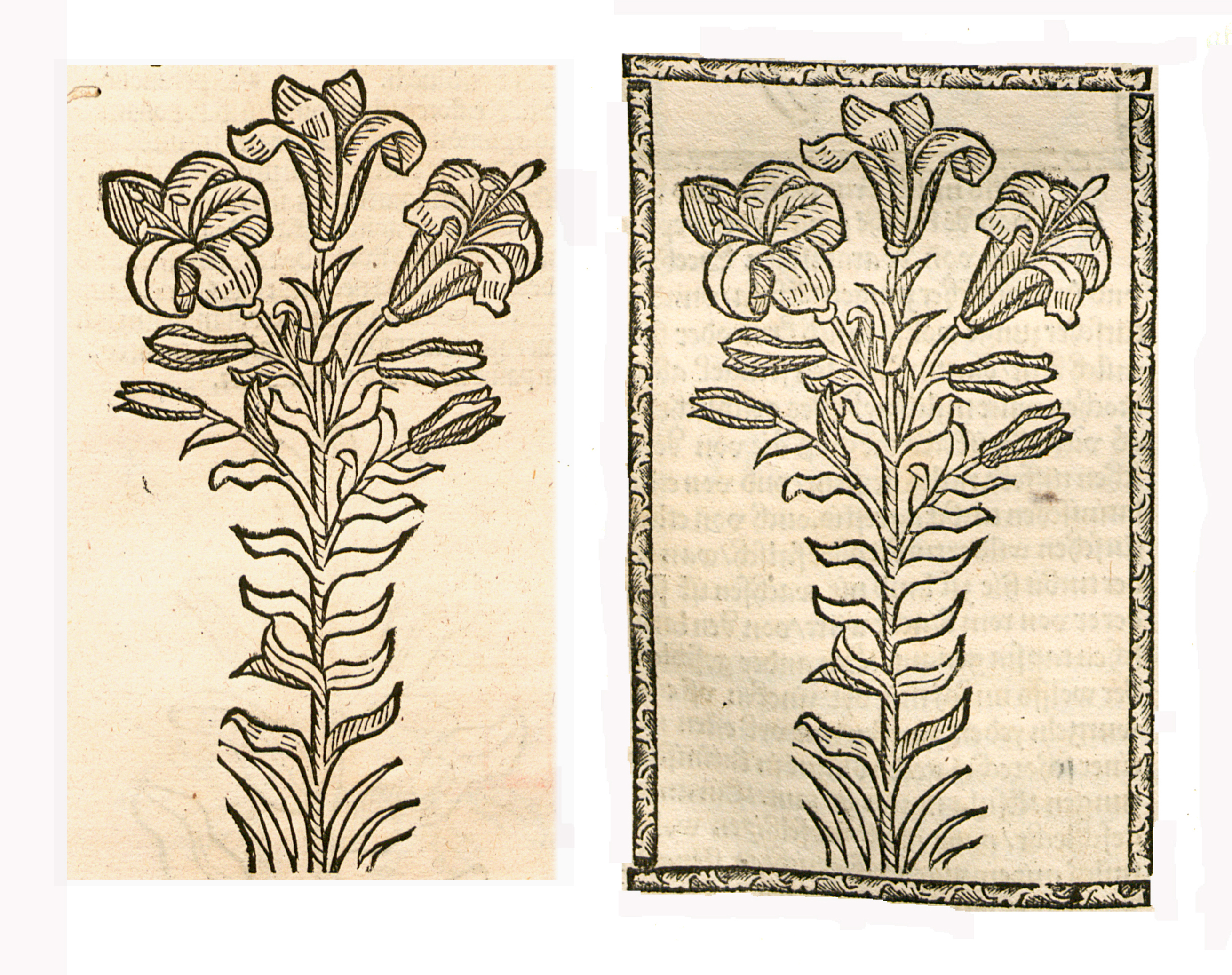 Abbildung von: Wyß Gilgen (Lilium candidum)